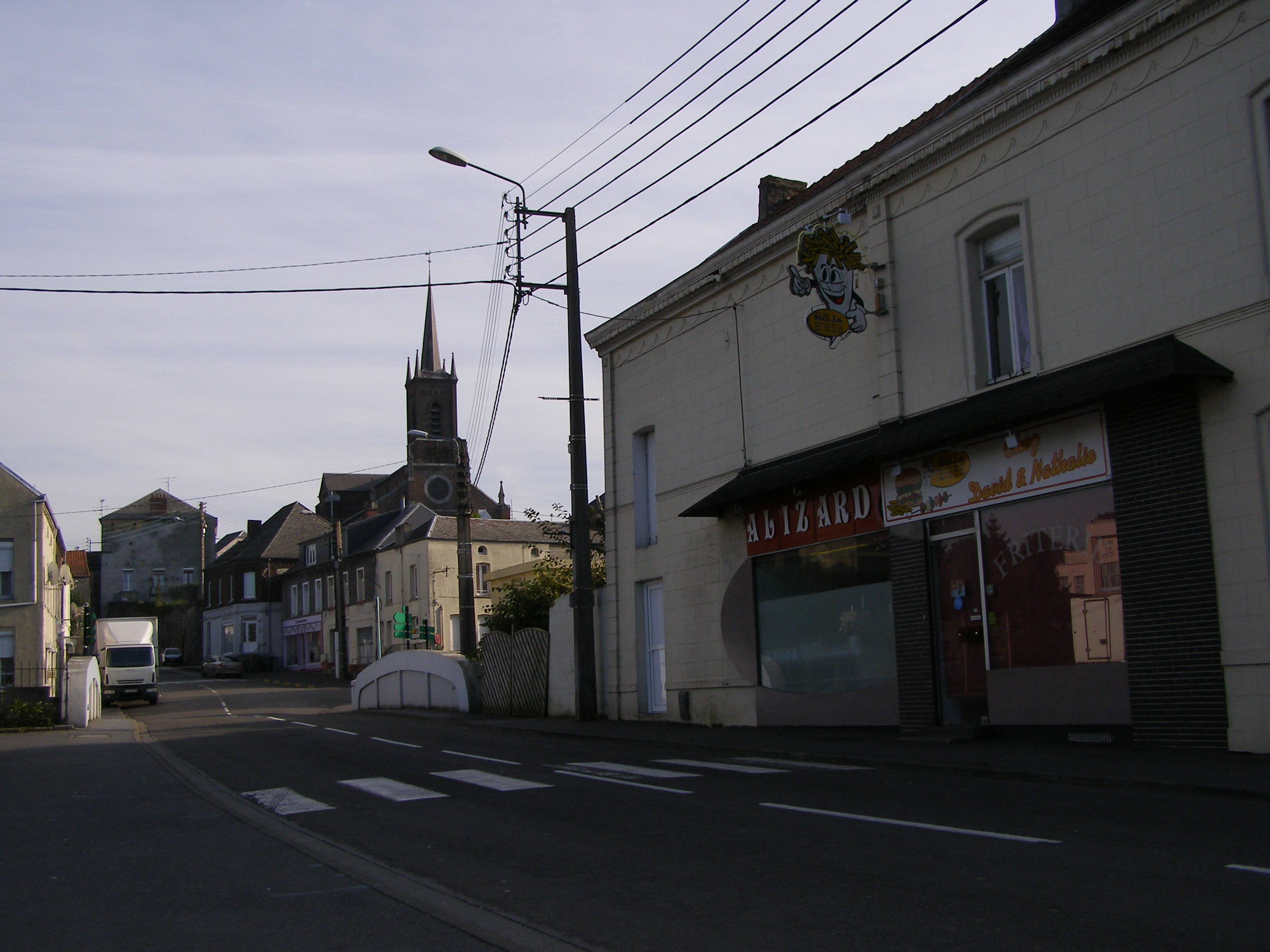 Le centre du village.